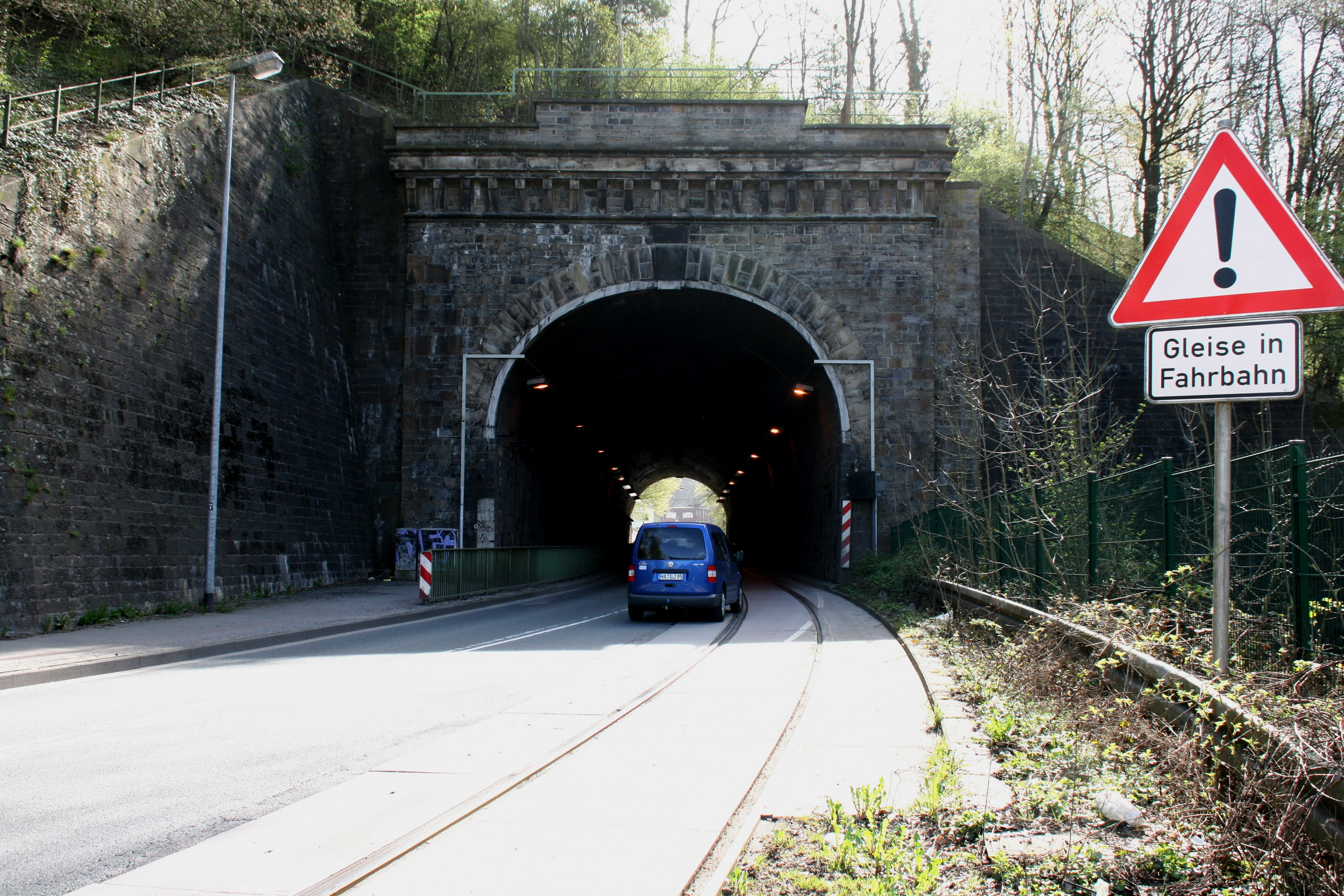 Kruiner Tunnel, Kölner Straße in Gevelsberg